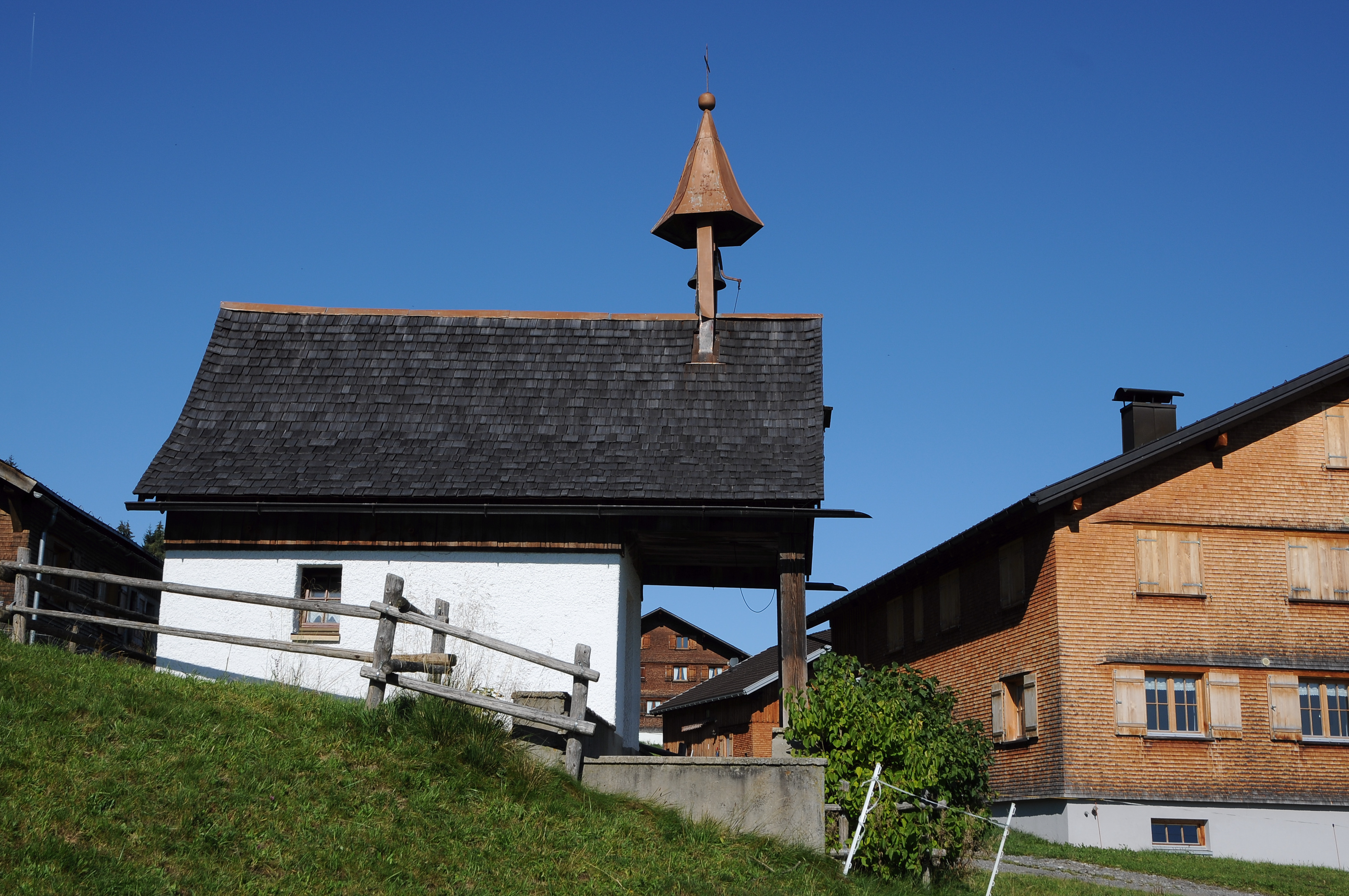 aus dem DEHIO Vorarlberg 1983: Kapelle hl. Maria, in Schwarzenberg, Weißtannen. Anstelle Altbau 1950 Neubau. Rechteckbau unter Satteldach mit Glockendachreiter, Flachdecke im Inneren. Neuromanischer Altar mit Figur hl. Maria aus der alten Kapelle. Info Das Objekt steht unter Denkmalschutz